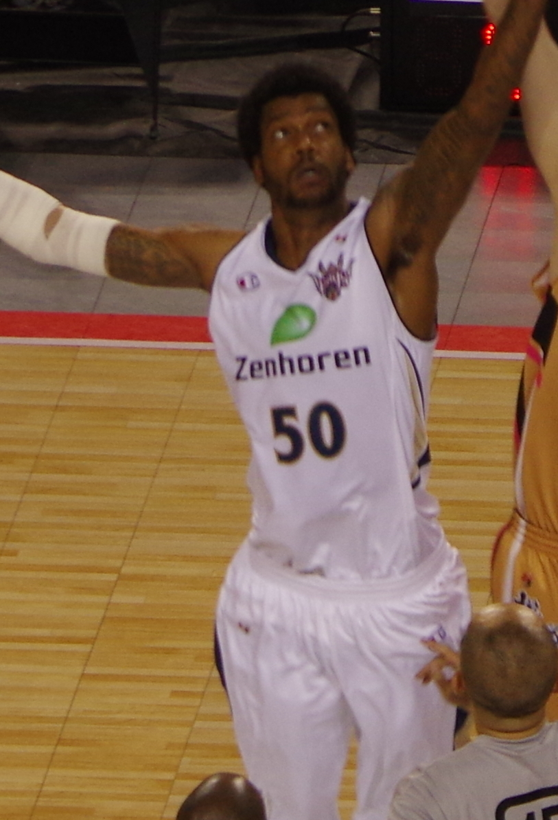 ｂｊリーグ 2013-2014シーズン プレイオフ ファイナルズ_023